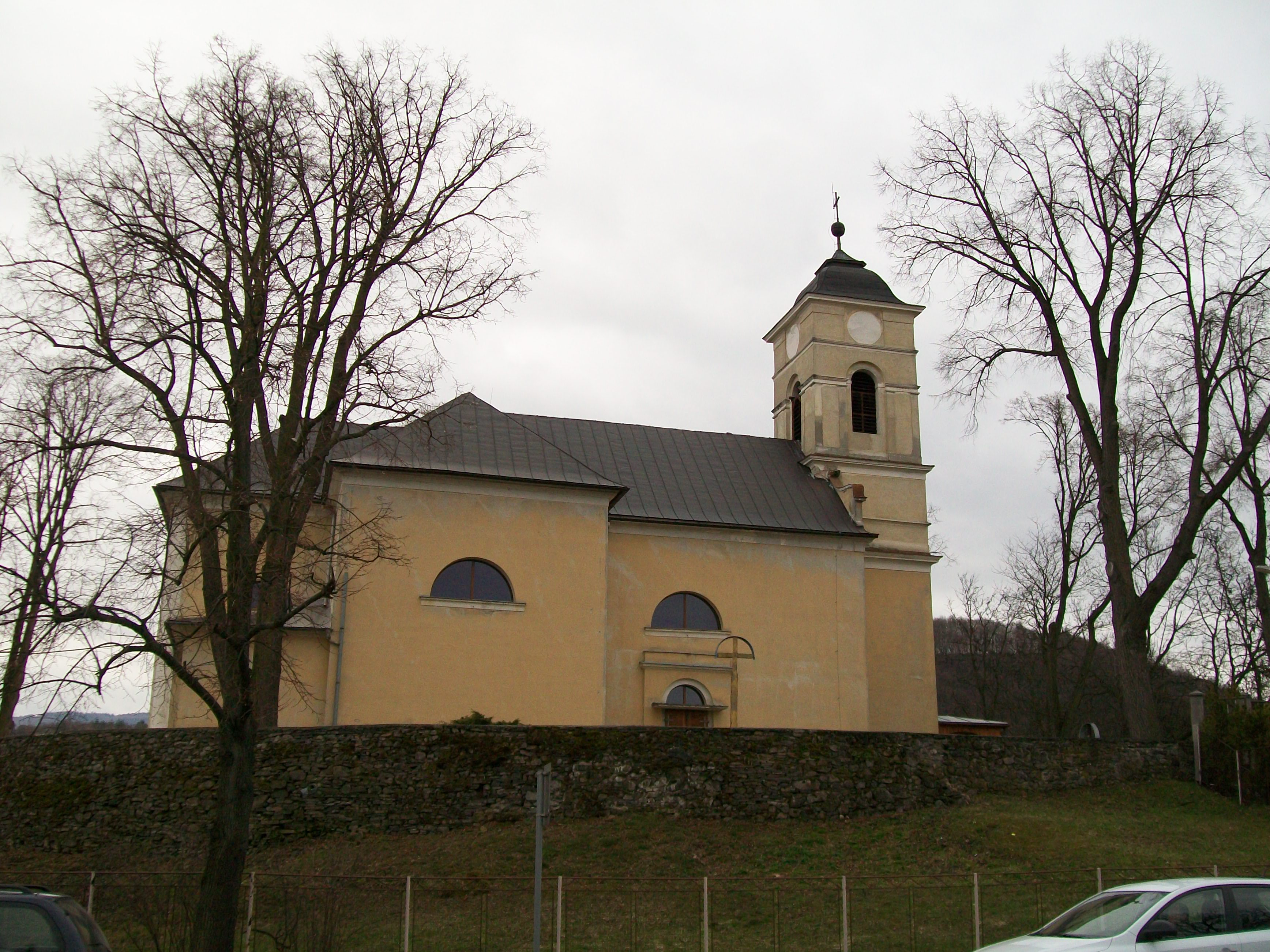 Rímsko-katolícky kostol Povýšenia Sv. Kríža v obci Zvolenská Slatina (kultúrna pamiatka) This medium shows the protected monument with the number 611-1144/0 in the Slovak Republic.